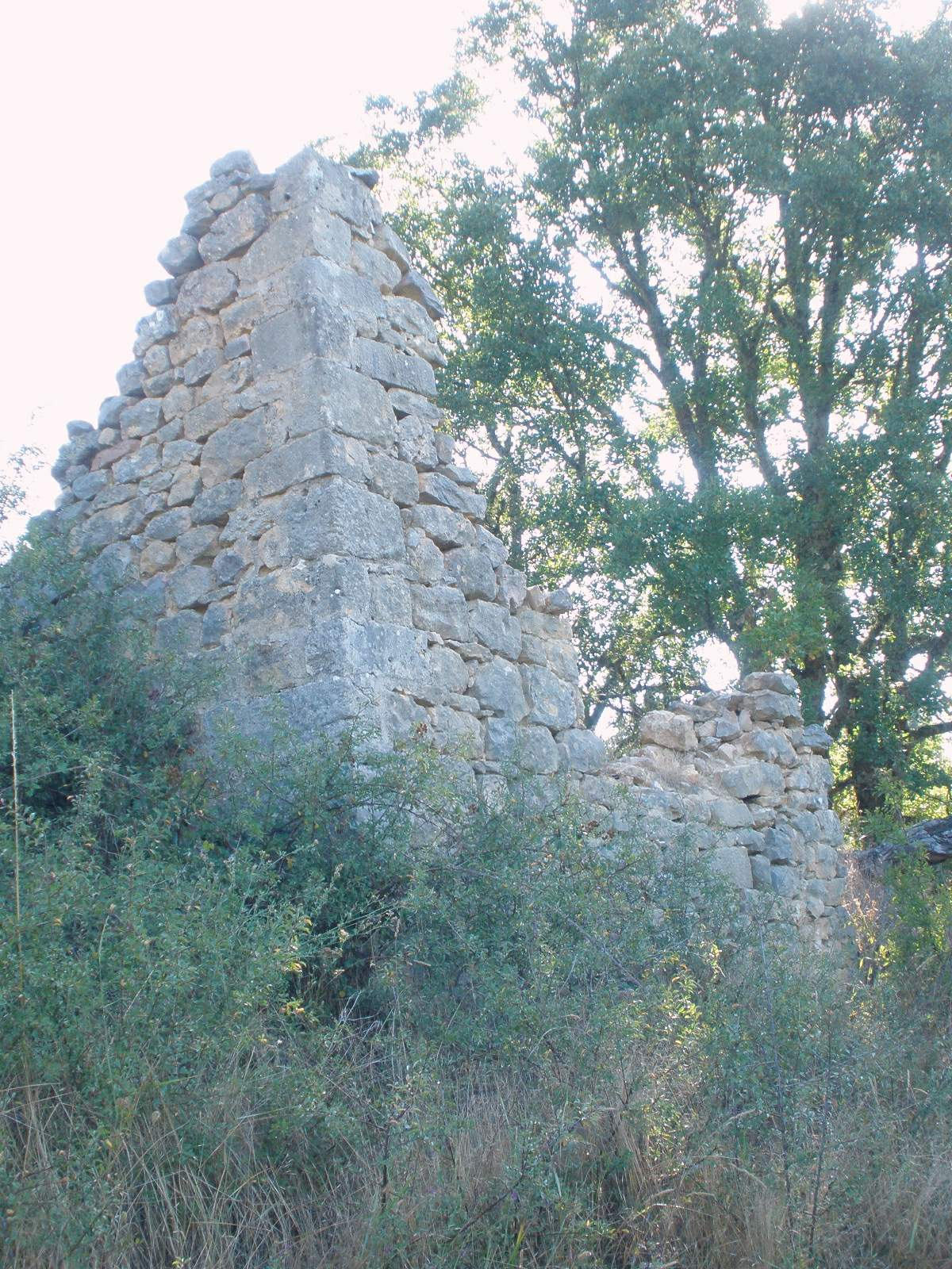 Ceniceros, pueblo abandonado y prácticamente desaparecido perteneciente al municipio de Sargentes de la Lora (provincia de Burgos, Castilla y León, España)